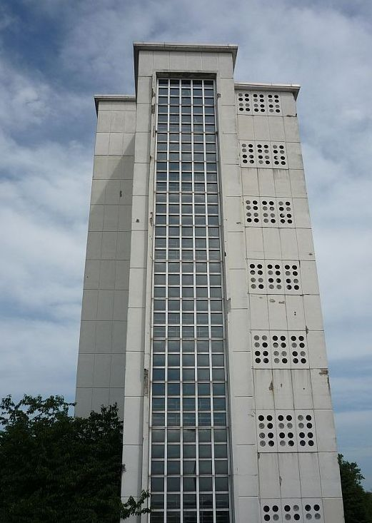 ehemalige Französische Botschaft in Saarbrücken, heute Ministerium für Bildung, Familie, Frauen und Kultur des Saarlandes (Westfassade)